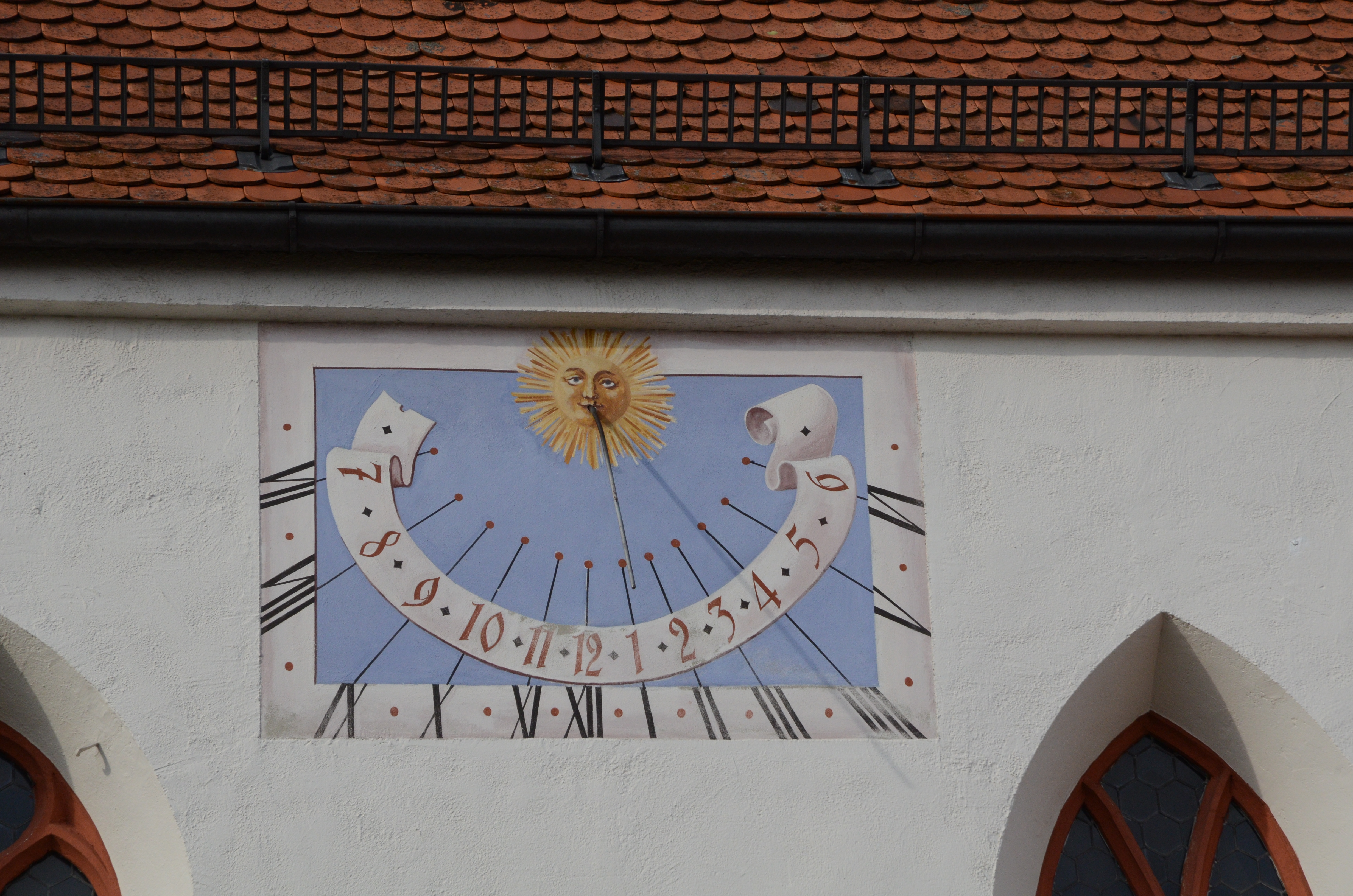 Sonnenuhr an der Evang.-Luth. Kirche Unser Frauen in Lauben